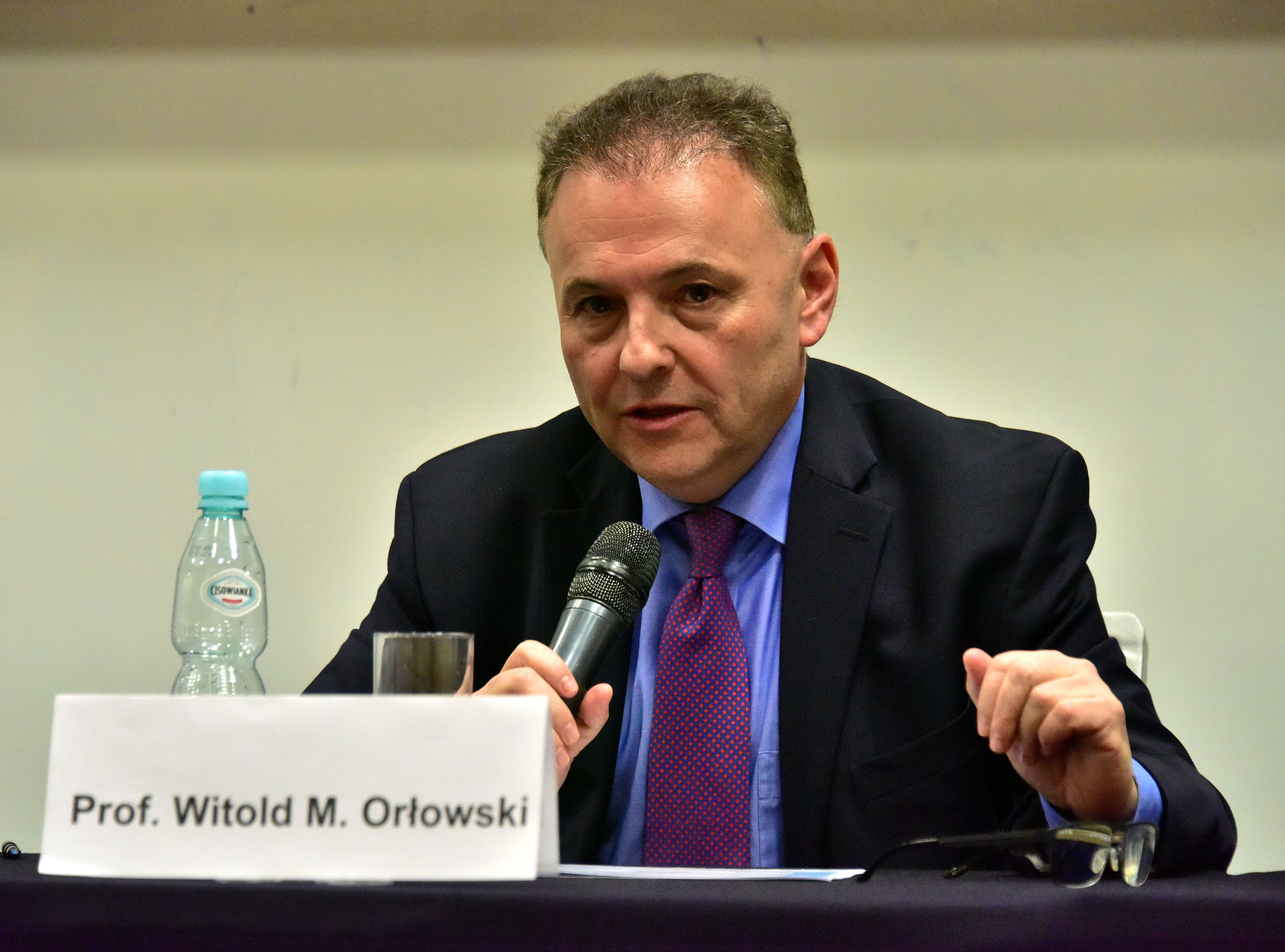 Prof. dr hab. Witold Orłowski podczas konferencji "W poszukiwaniu lepszego świata . Ekonomia i polityka" na Akademii Leona Koźmińskiego w Warszawie